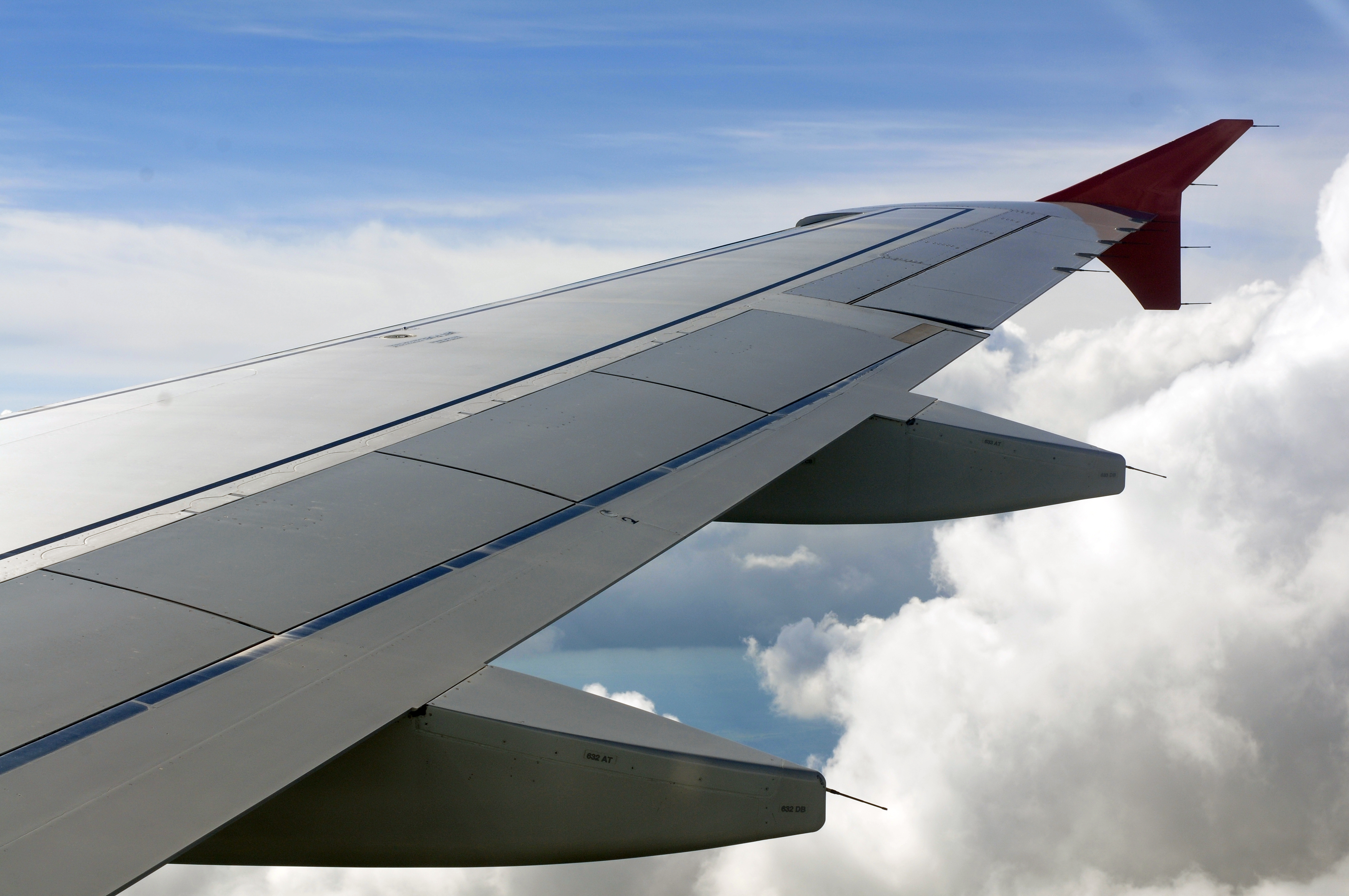 Landeanflug Wien-Schwechat